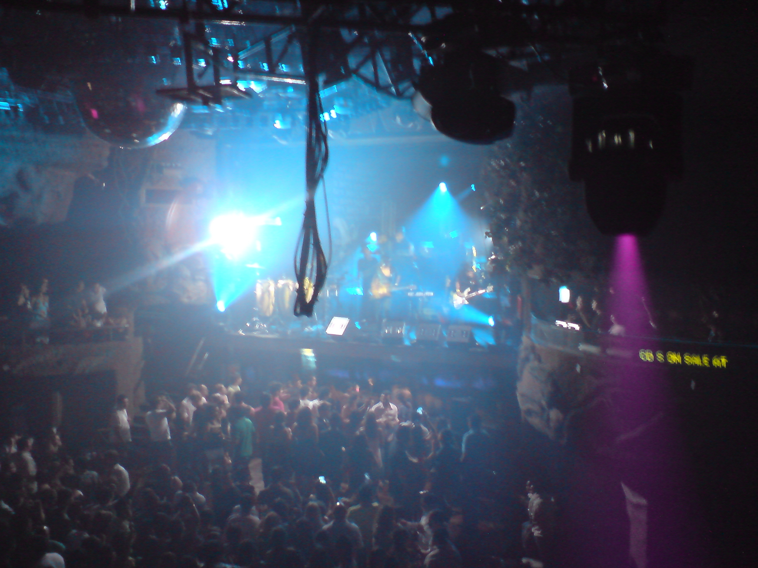 Sussie 4 en una presentación en una discoteque en Cancún, México.